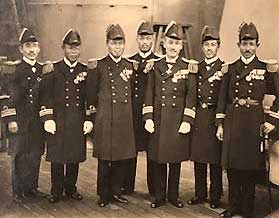 義祖父の海軍時代のアルバムから持ってきました